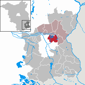 Teichland in Brandenburg (Country) - District Spree-Neiße